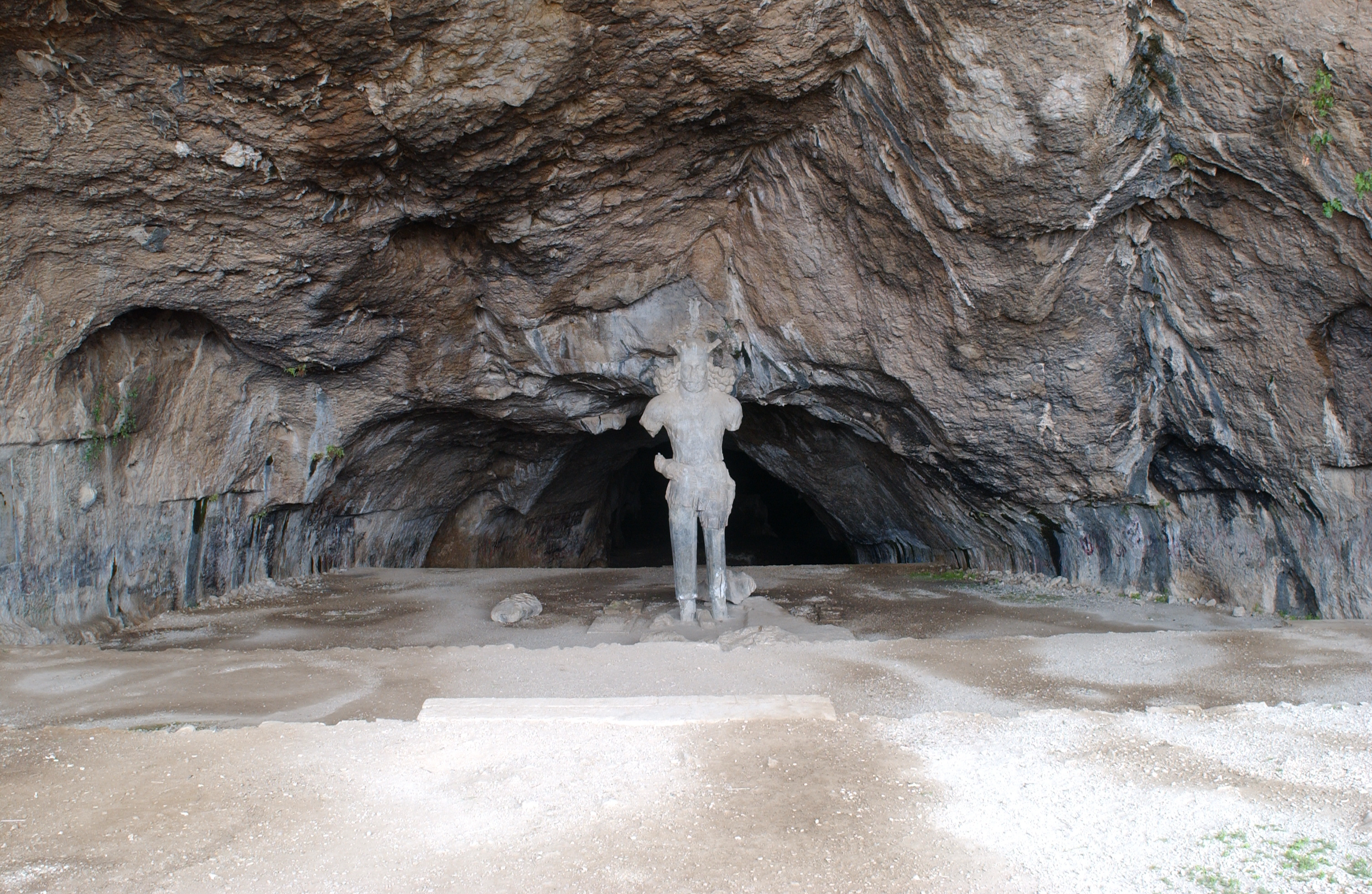 Accès difficile pour arriver à la grotte